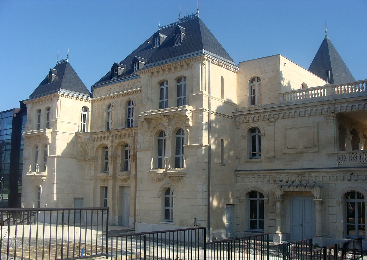 Le château de la Buzine, façade nord. Sur la gauche on aperçoit l'aile moderne surajoutée pour le futur musée.